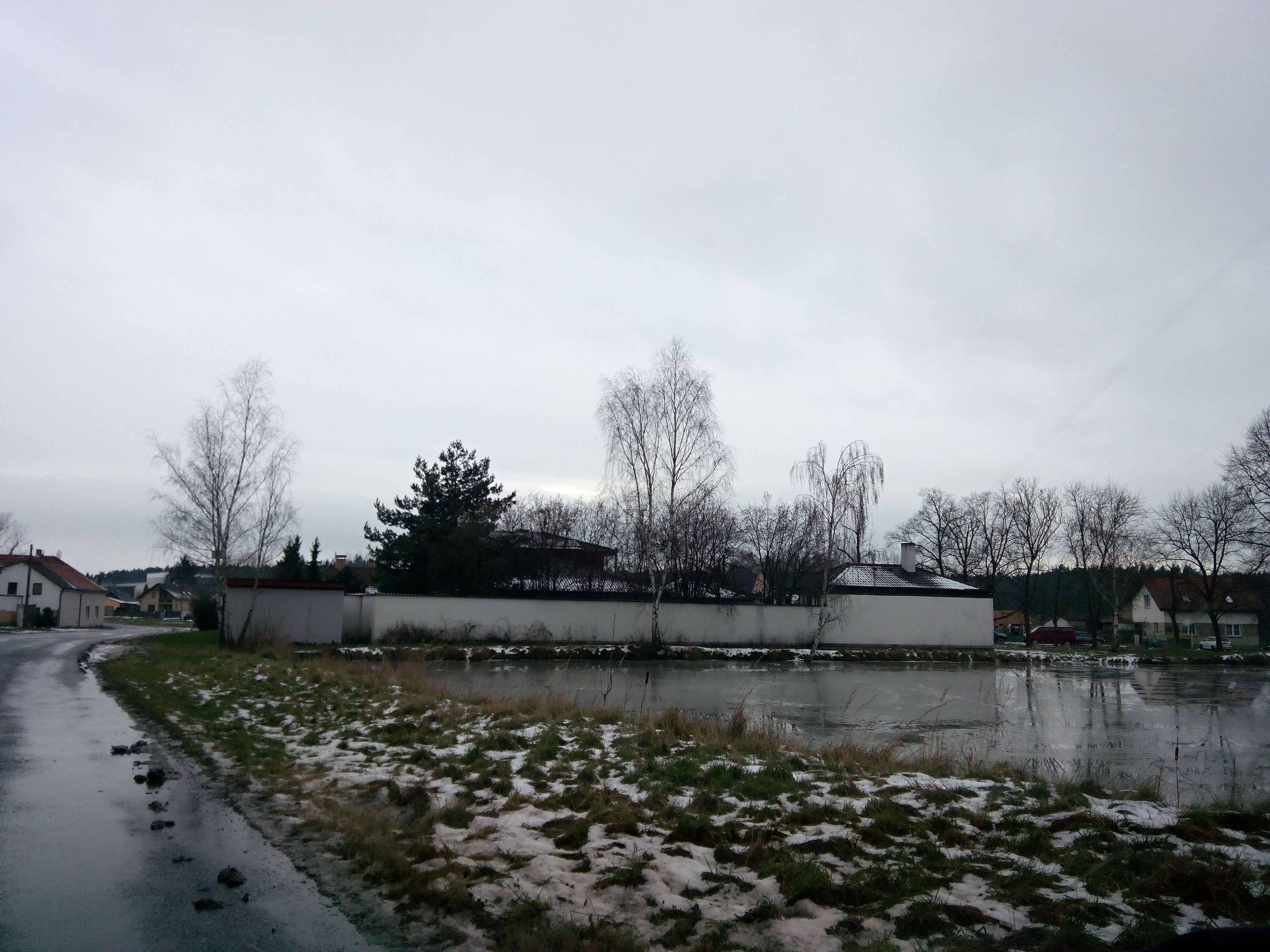 Rybníček